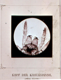 Mikrofoto "Kopf der Kreuzspinne"